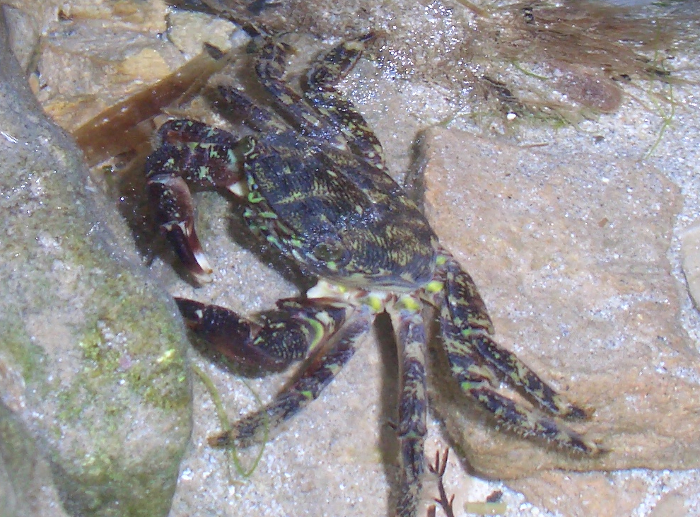 Pachygrapsus marmoratus (Grapsidae). Peguera (Mallorca)